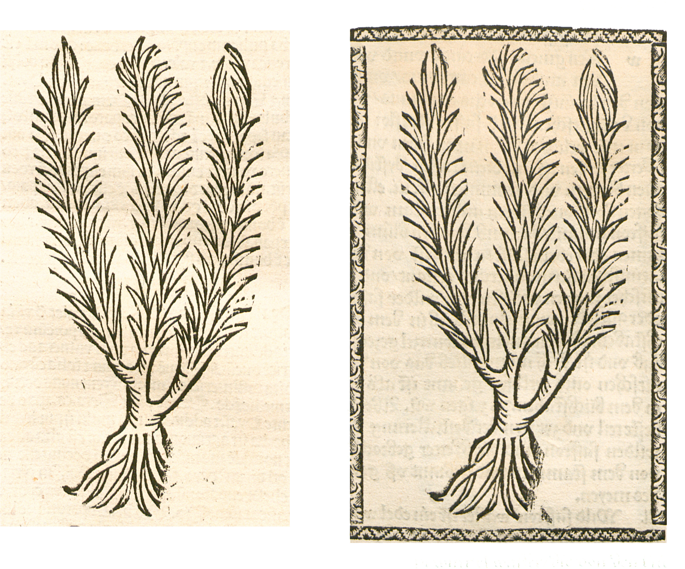 Abbildung von Adonis vernalis